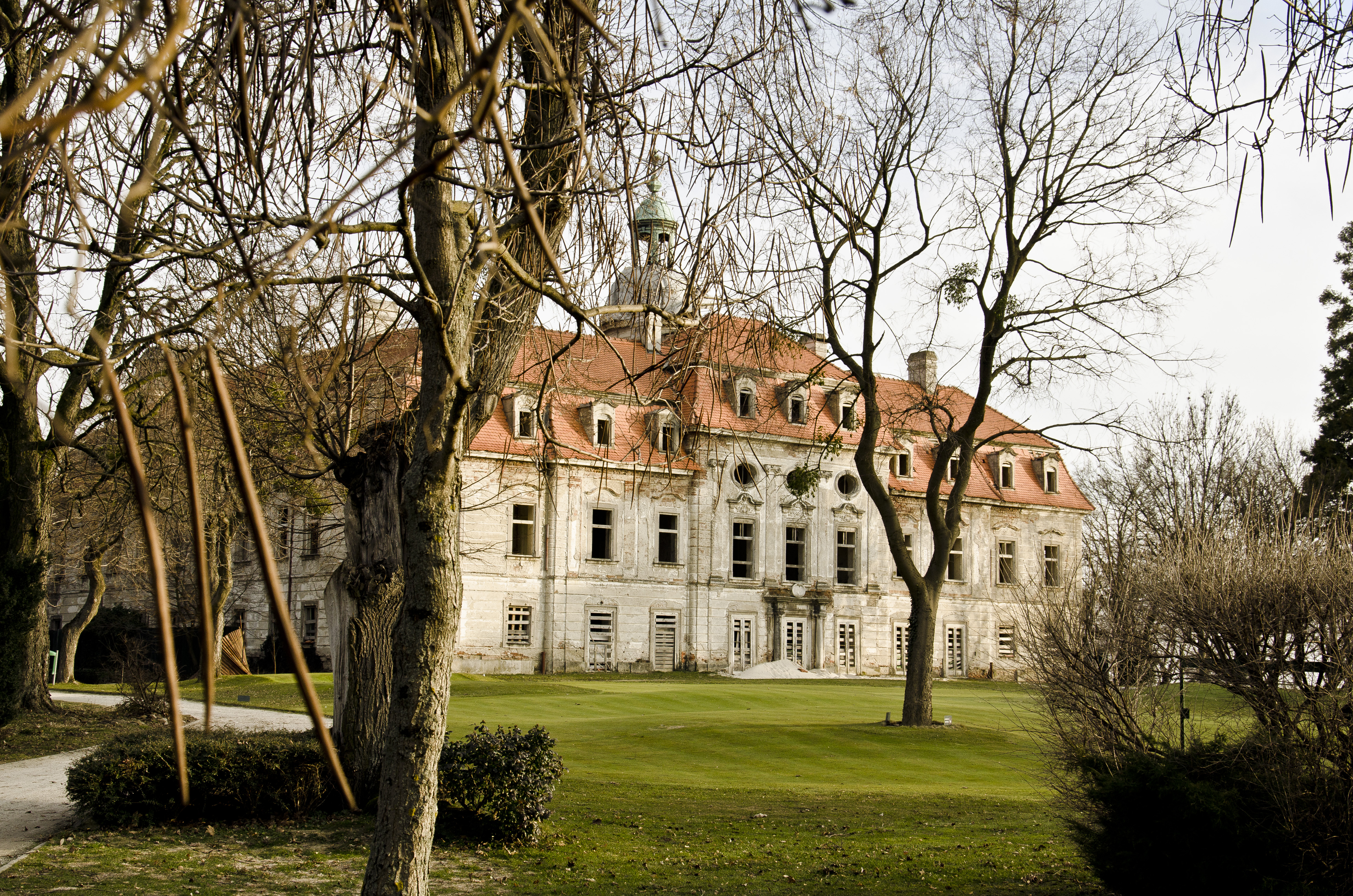 Kaštieľ